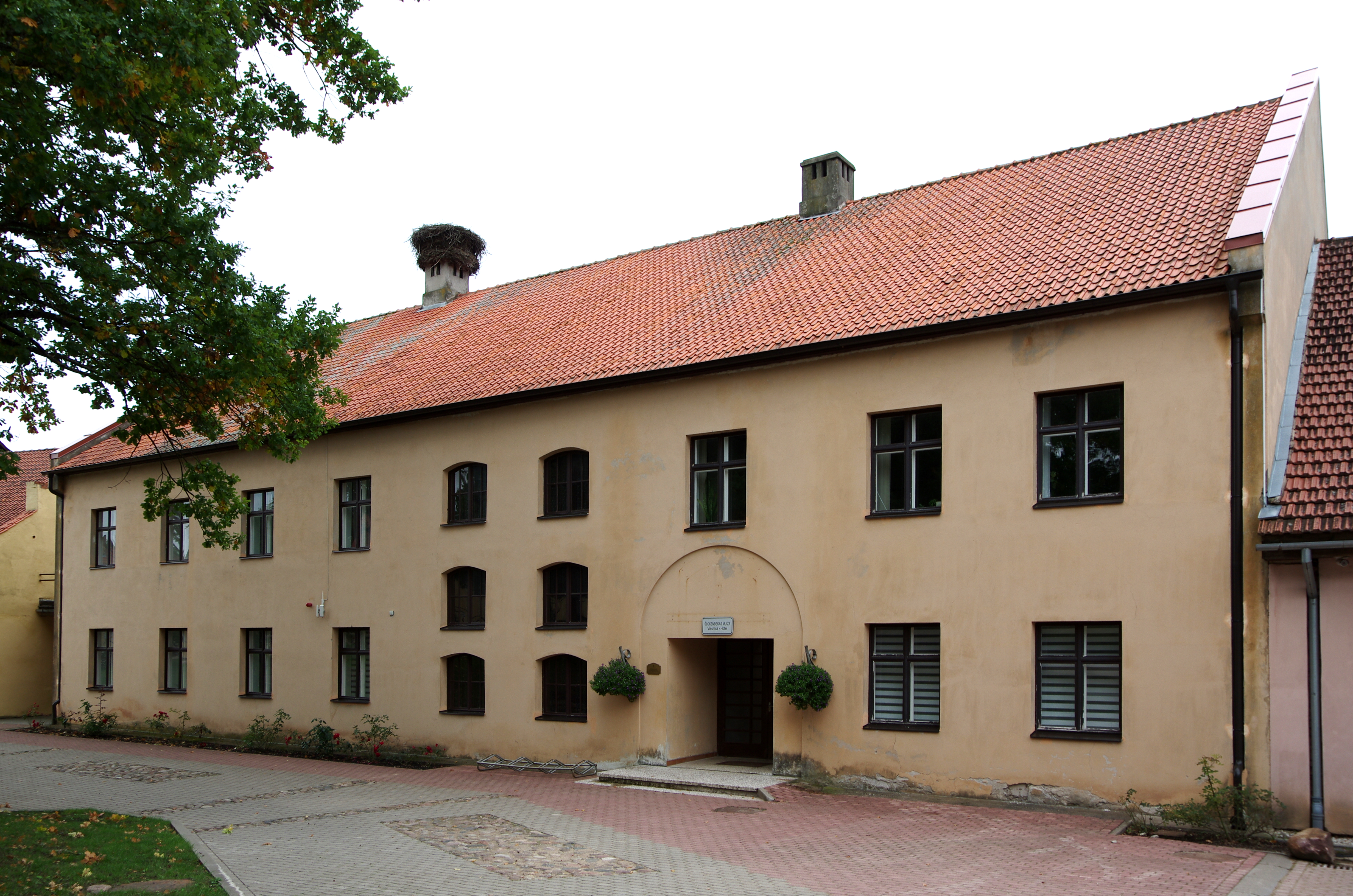 Šlokenbekas pils, semināru centrs, bijušais spirta brūzis un alus darītava. Celts XV–XVII gadsimtā, rekonstruēta 1996. g.